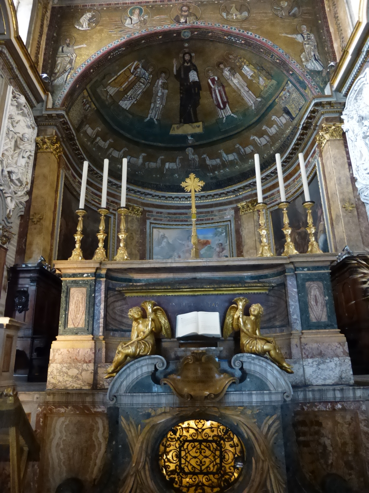 Roma, basilica di S. Marco, abside e altar maggiore